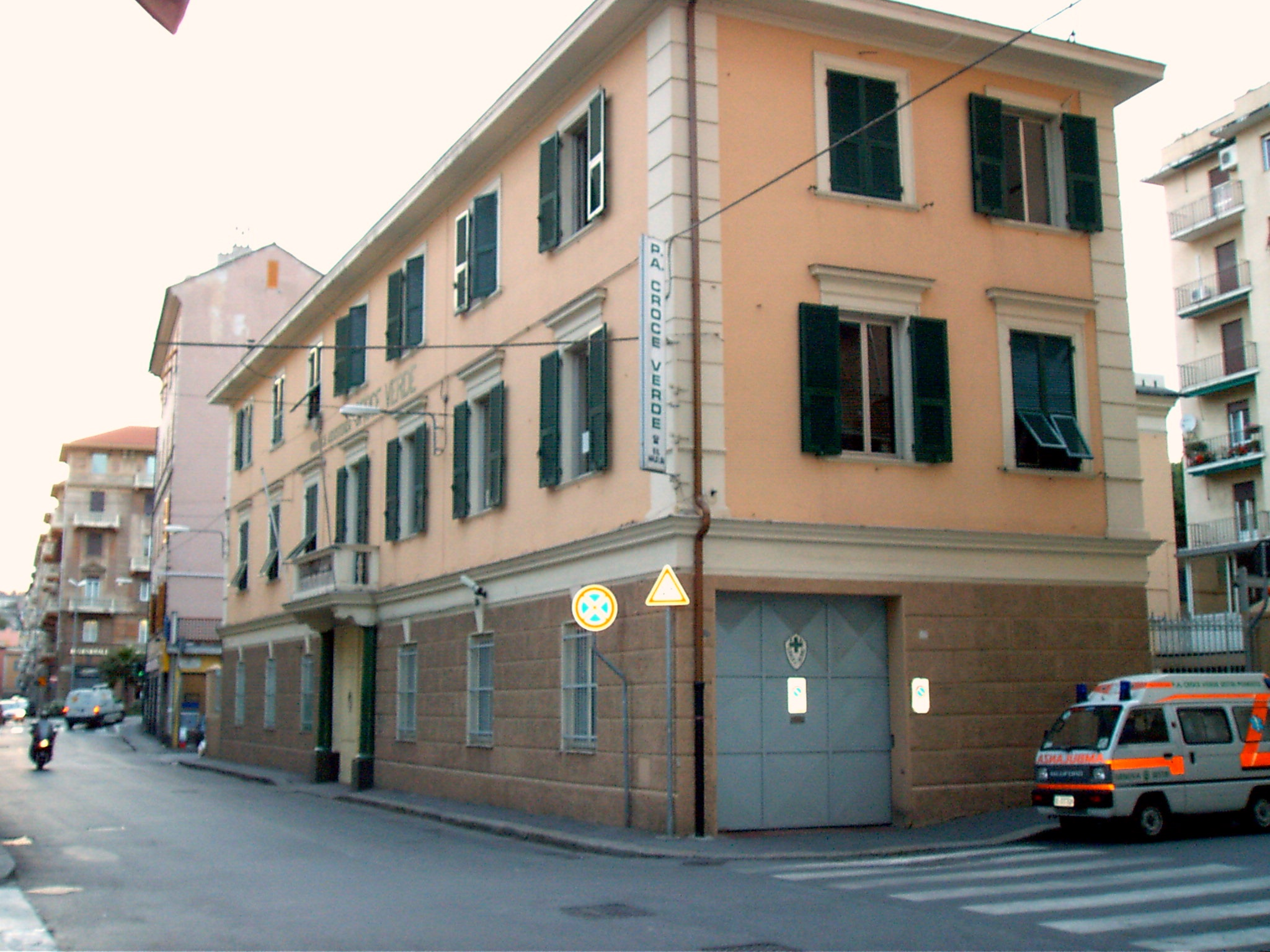 Palazzina Liberti, la storica sede della PA Croce Verde, Sestri Ponente, Genova